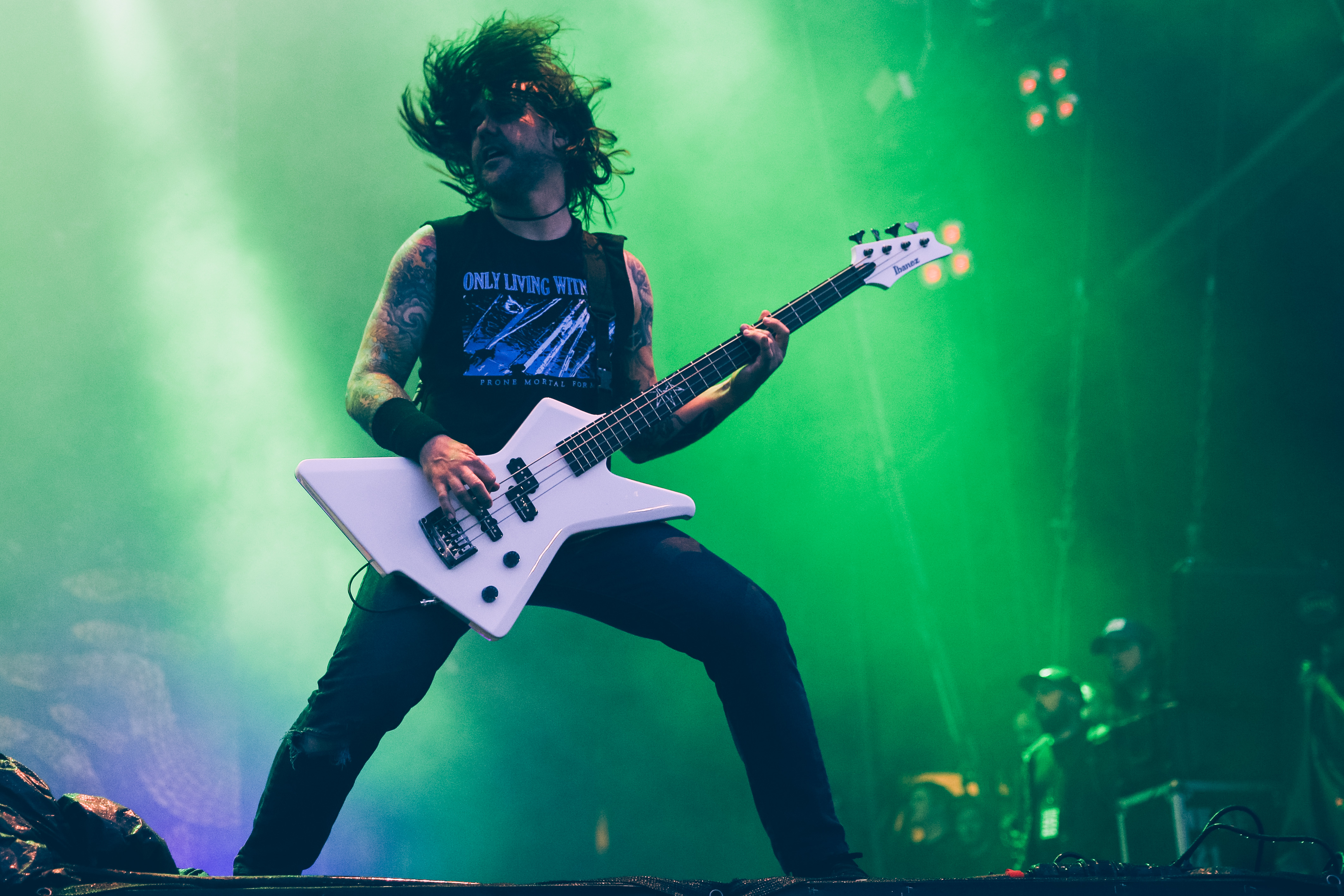 Killswitch Engage at Rock am Ring (2016), Flugplatz Mendig, Mendig (DEU) /// leokreissig.de for Wikimedia Commons